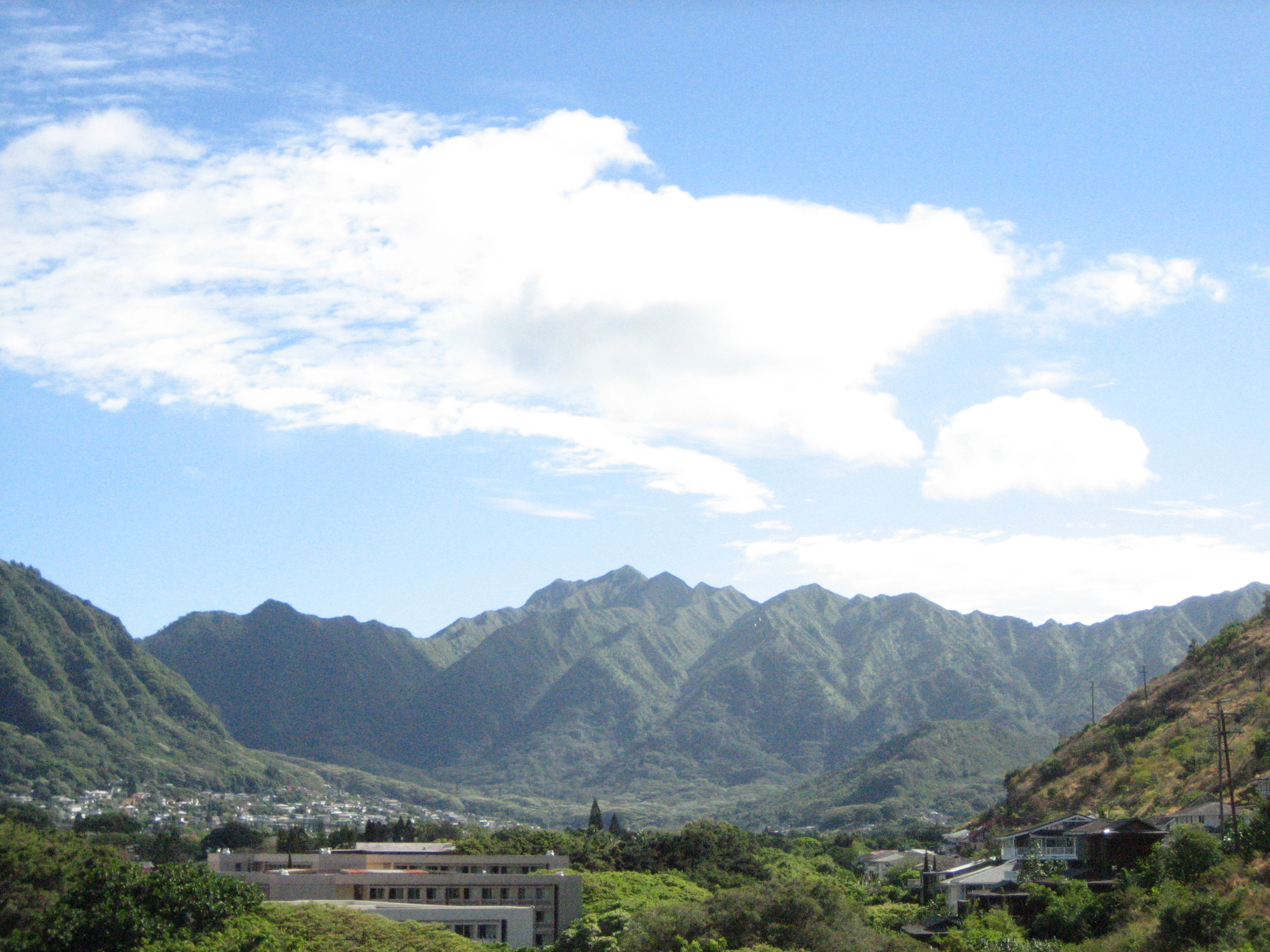 Mānoa Valley, Oʻahu, Hawaiʻi, USA